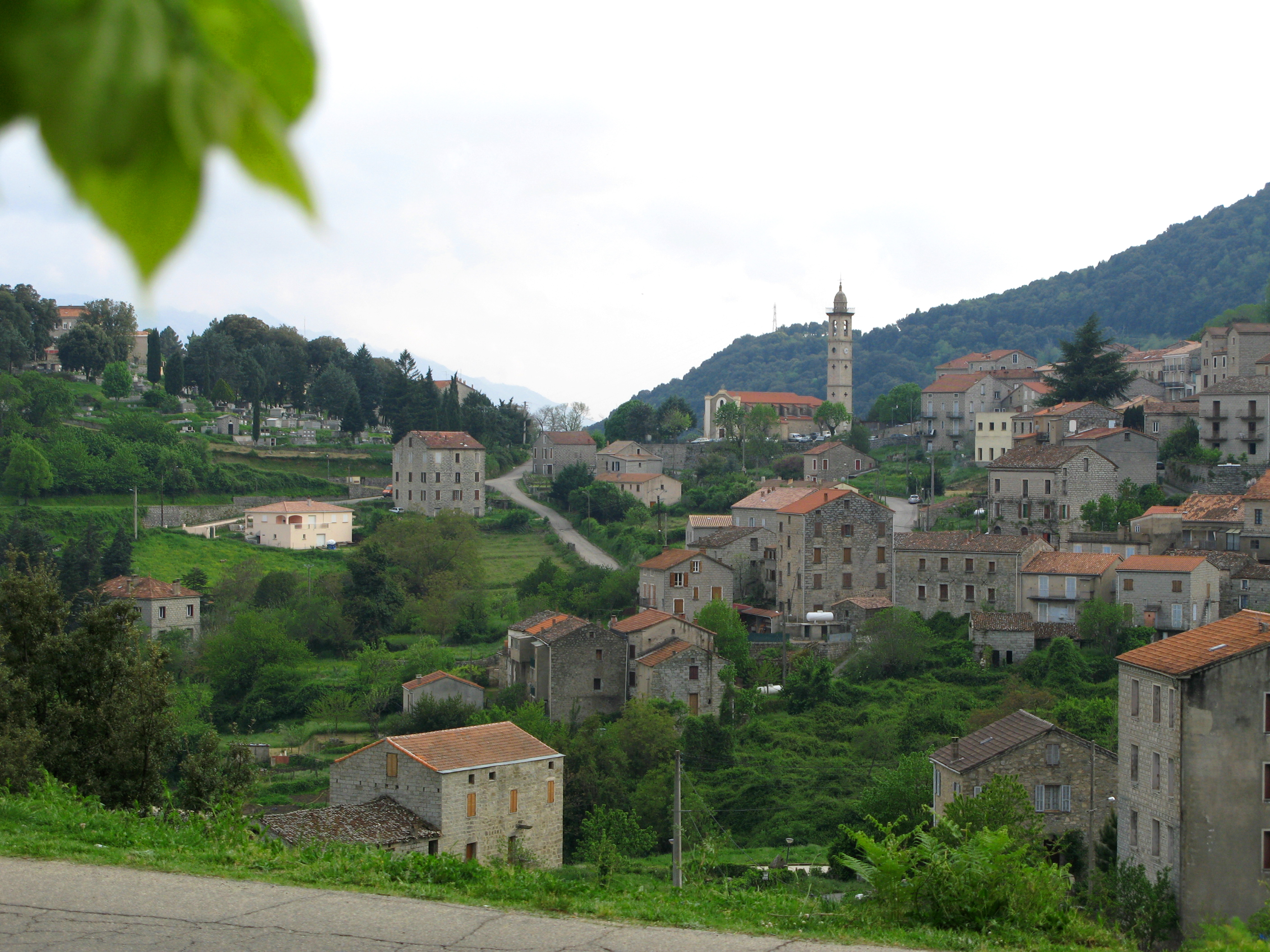 Levie (Corse-du-Sud, France)